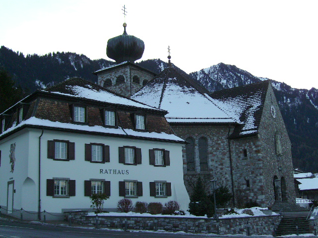 City Hall & St Joseph Church, Triesenberg, Lichtenstein